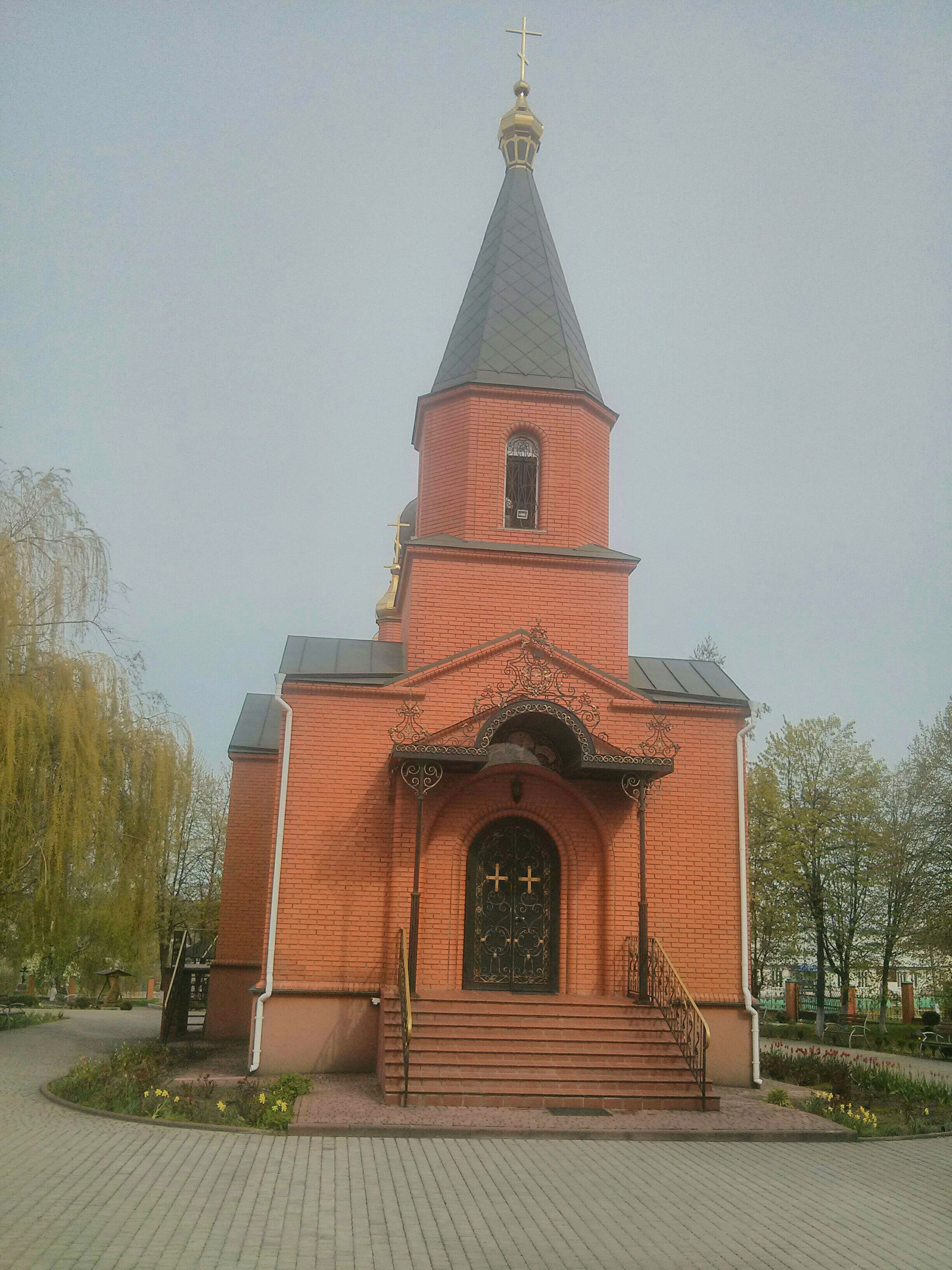 2017 рік